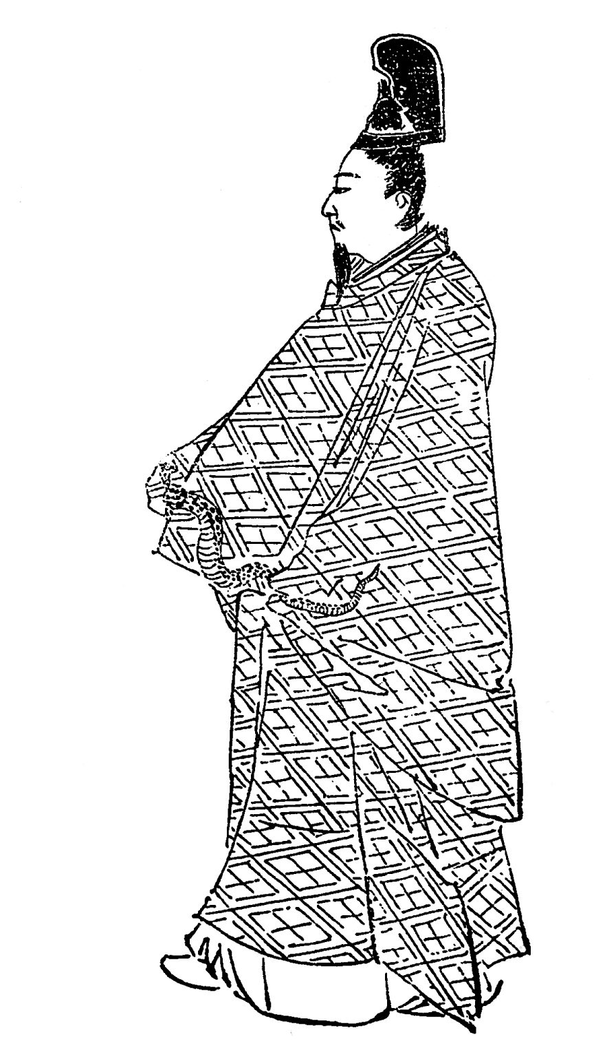 平重盛。平家の一門。平安時代末期の武将。／江戸時代『前賢故実』より。画：菊池容斎